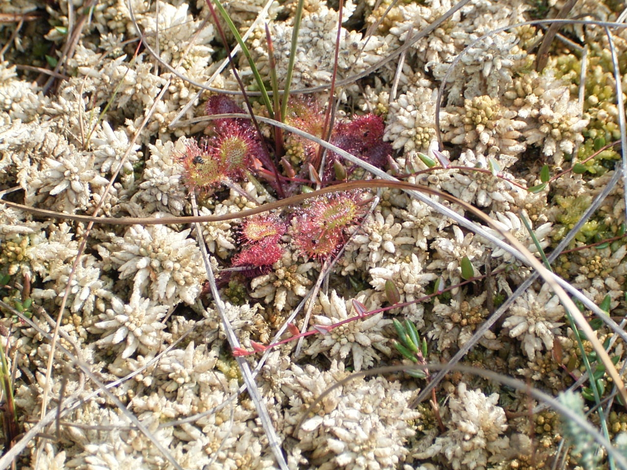 Bleichmoospolster (Sphagnum spec.) mit Sonnentau (Drosera rotundifolia) sowie Moosbeere (Vaccinium oxycoccos) und Rosmarinheide (Andromeda polifolia); Norddeutschland